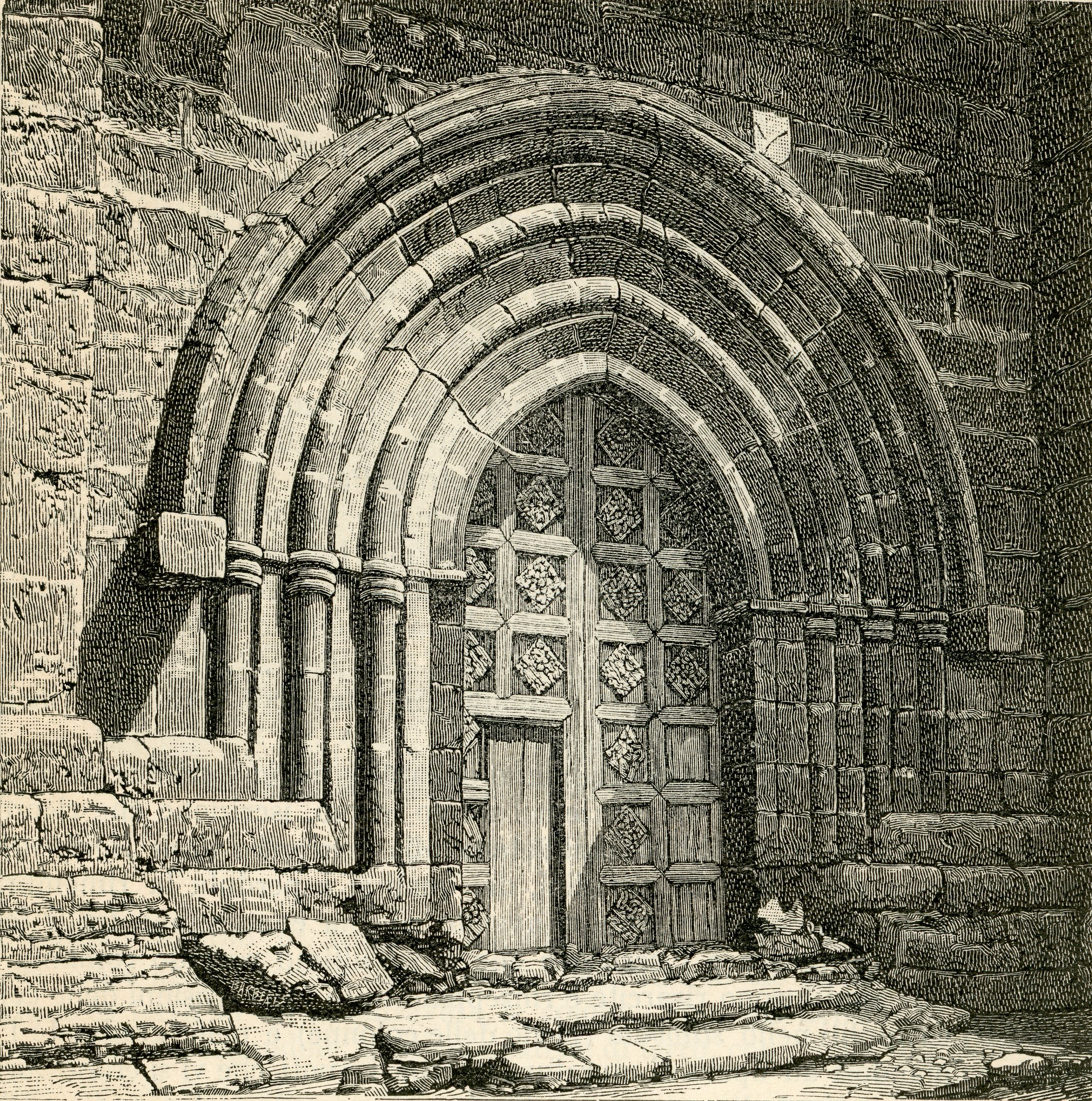 Agrigento: porta della Chiesa di San Nicolò. Xilografia di Giuseppe Barberis.